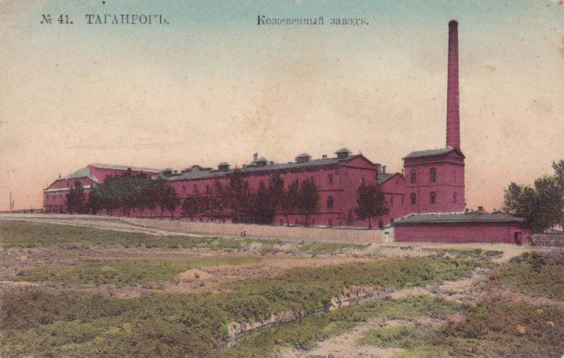 Таганрогский кожевенный завод, Таганрог. Открытка издательства Т-ва Шведиковъ и Лукьяненко "№ 41. ТАГАНРОГЪ. Кожевенный заводъ"